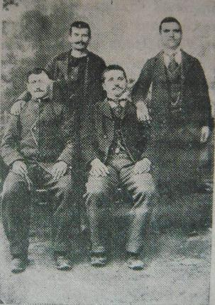 Васил Докторов, Кузман Коруев от Райково, Владимир Бочуков, Петър Кузманов